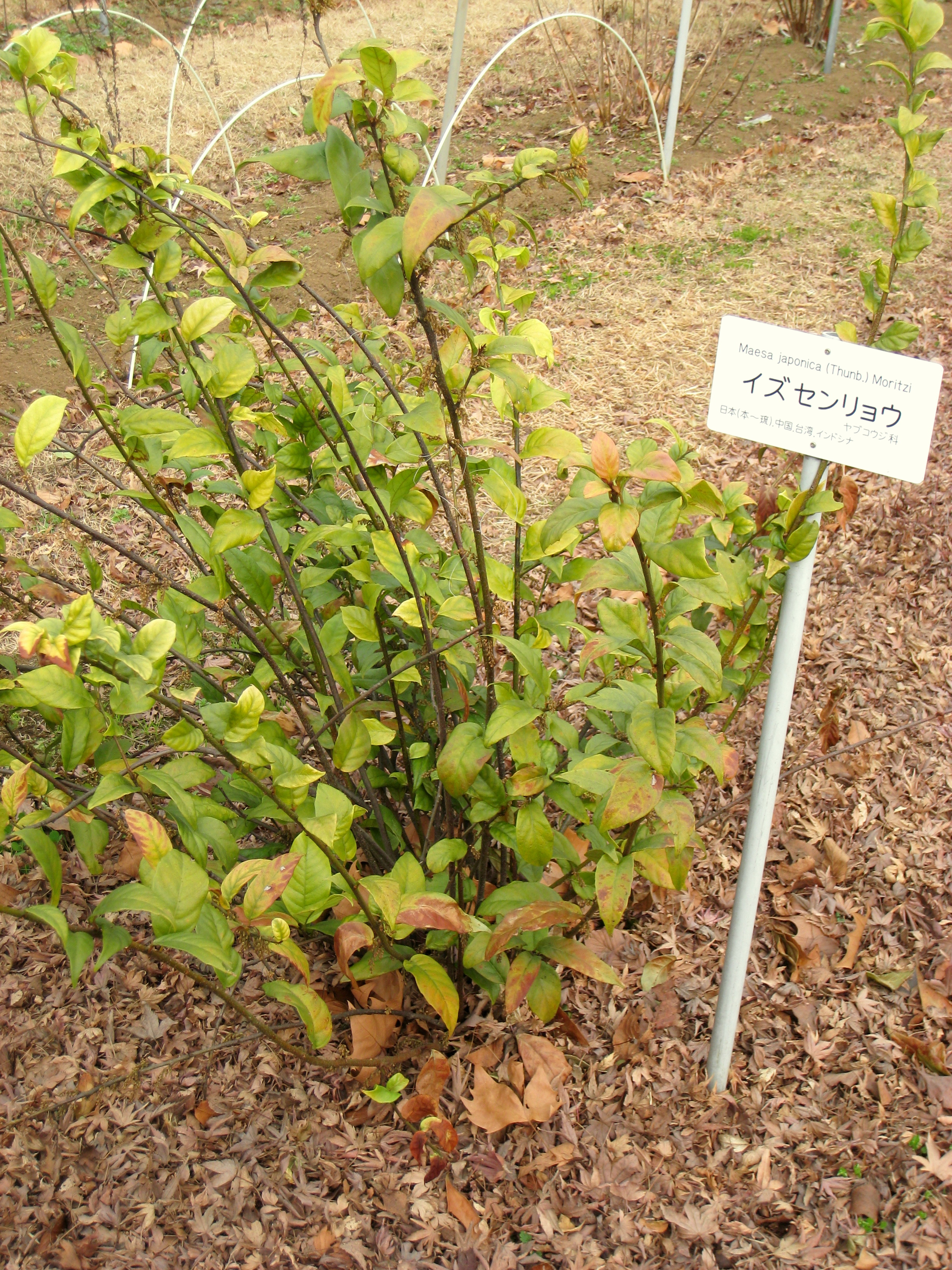 Maesa japonica in Koishikawa Botanical Gardens, Tokyo, Japan.